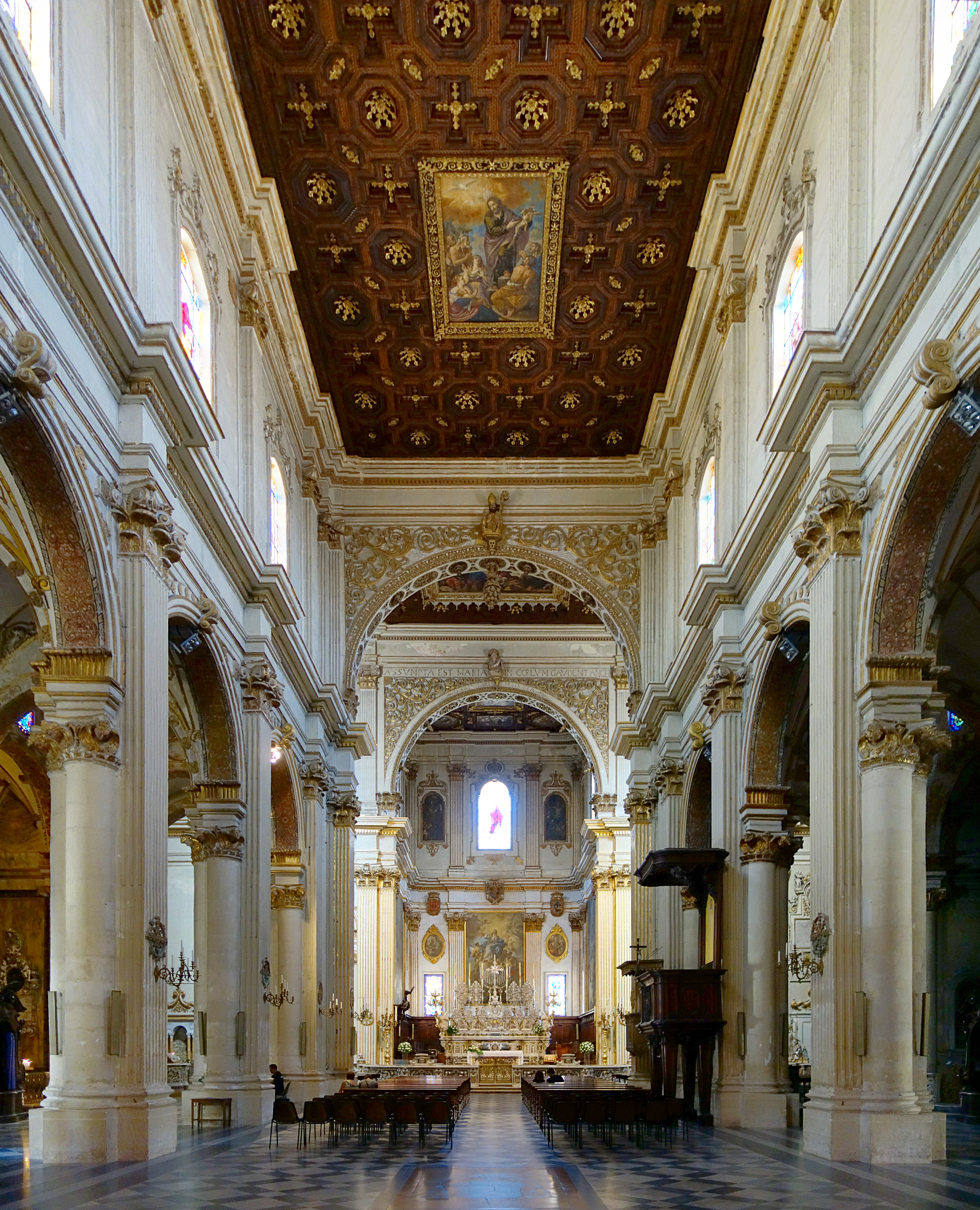 La nef du Duomo de Lecce.